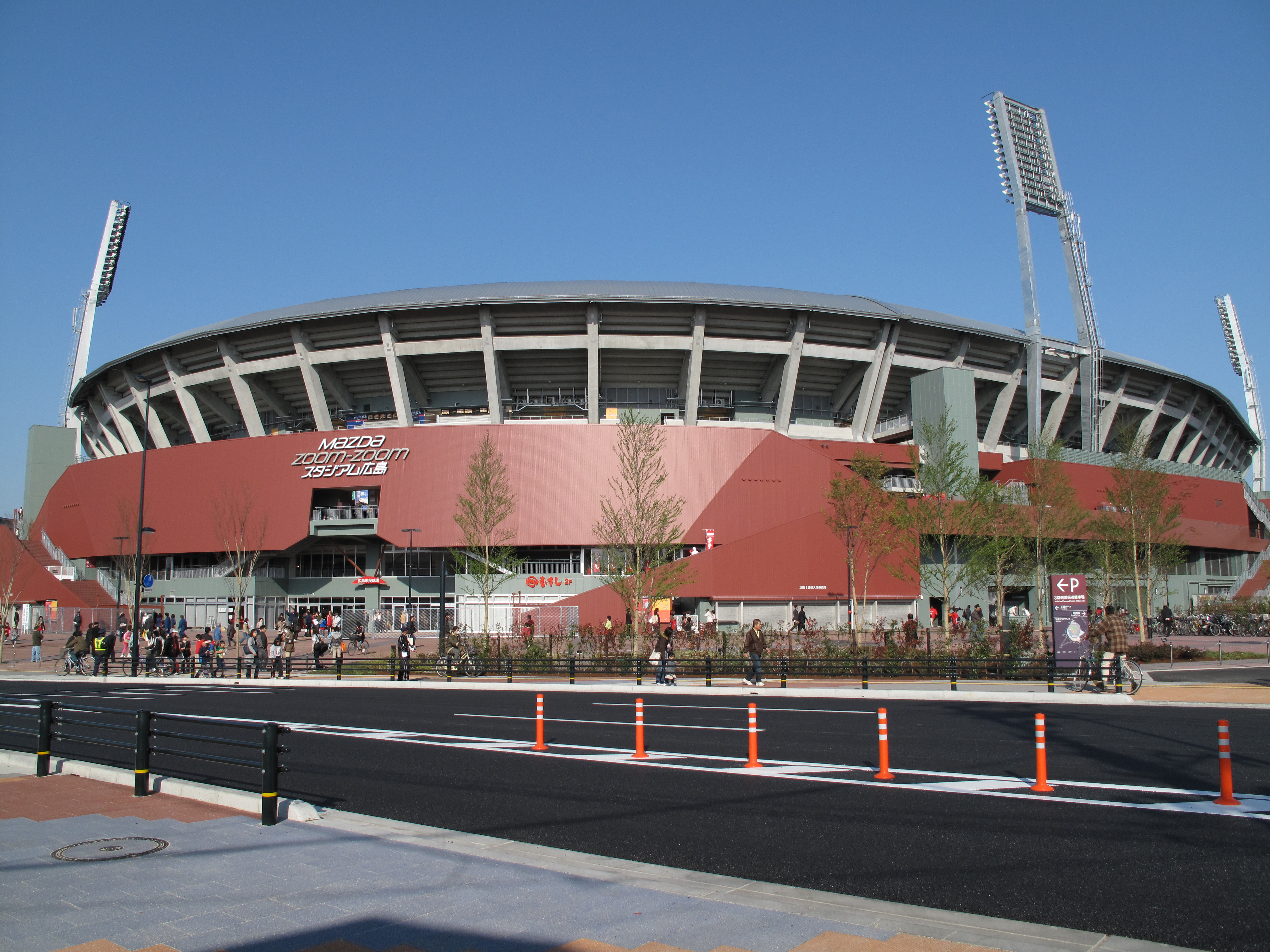 2009年4月2日、広島市民球場（マツダスタジアム）エントランス近辺より本人撮影 2009年4月2日 (木) 21:34 . . HKT3012 . . 4,416×3,312 (6.07 メガバイト)